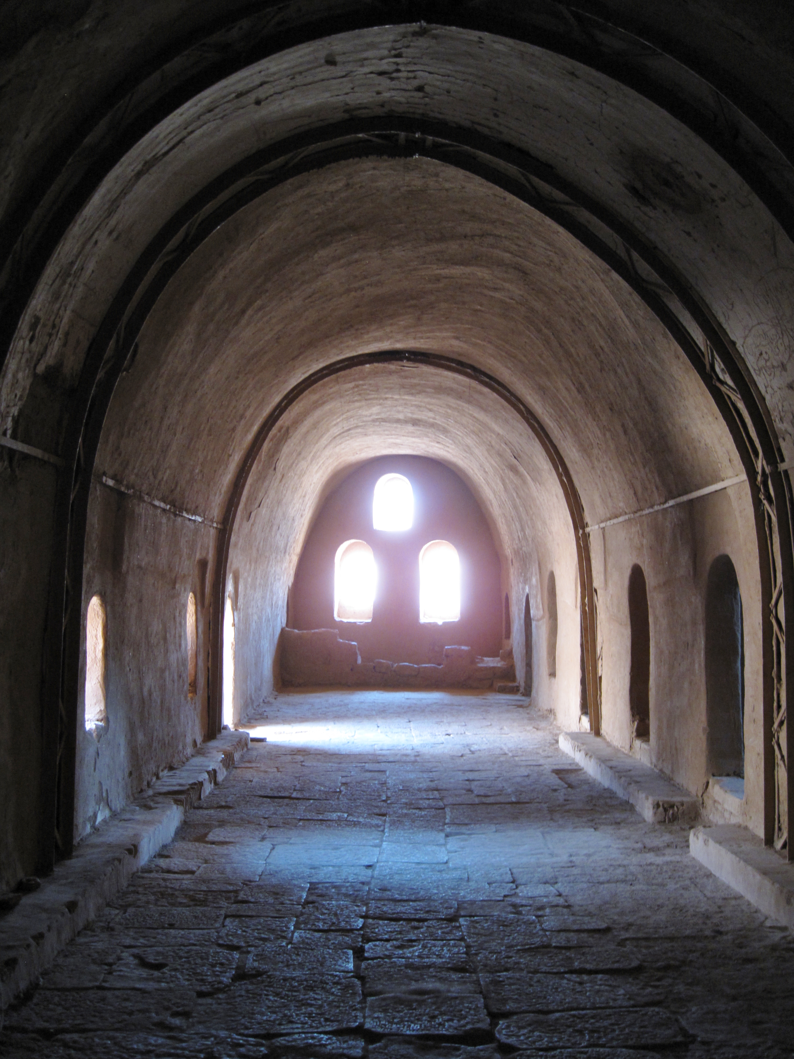 Ehemaliges Dormitorium, Zellengang zu den einzelnen Schlafräumen der Mönche, im Simeonskloster (Deir Amba Samaan) westlich des Nils in Assuan, Ägypten